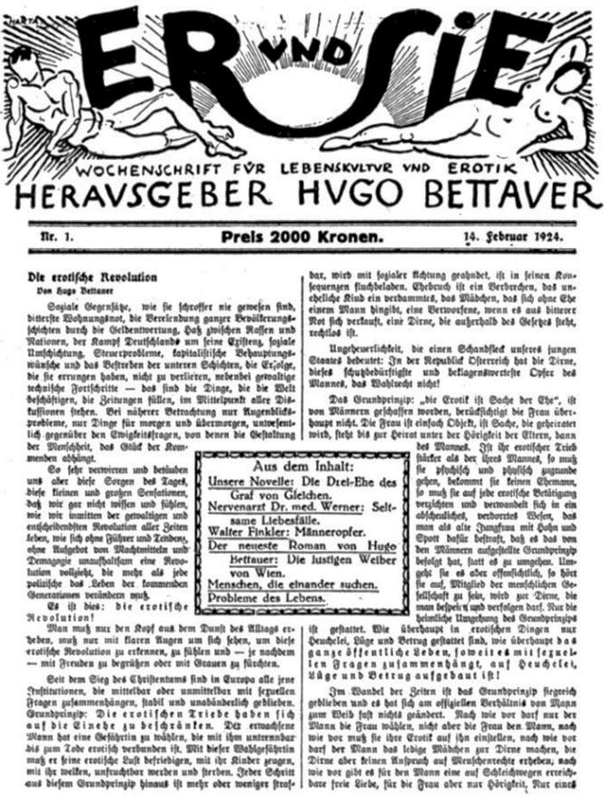 Erstes Titelblatt von Hugo Bettauers Zeitschrift Er und Sie, Wien 1924